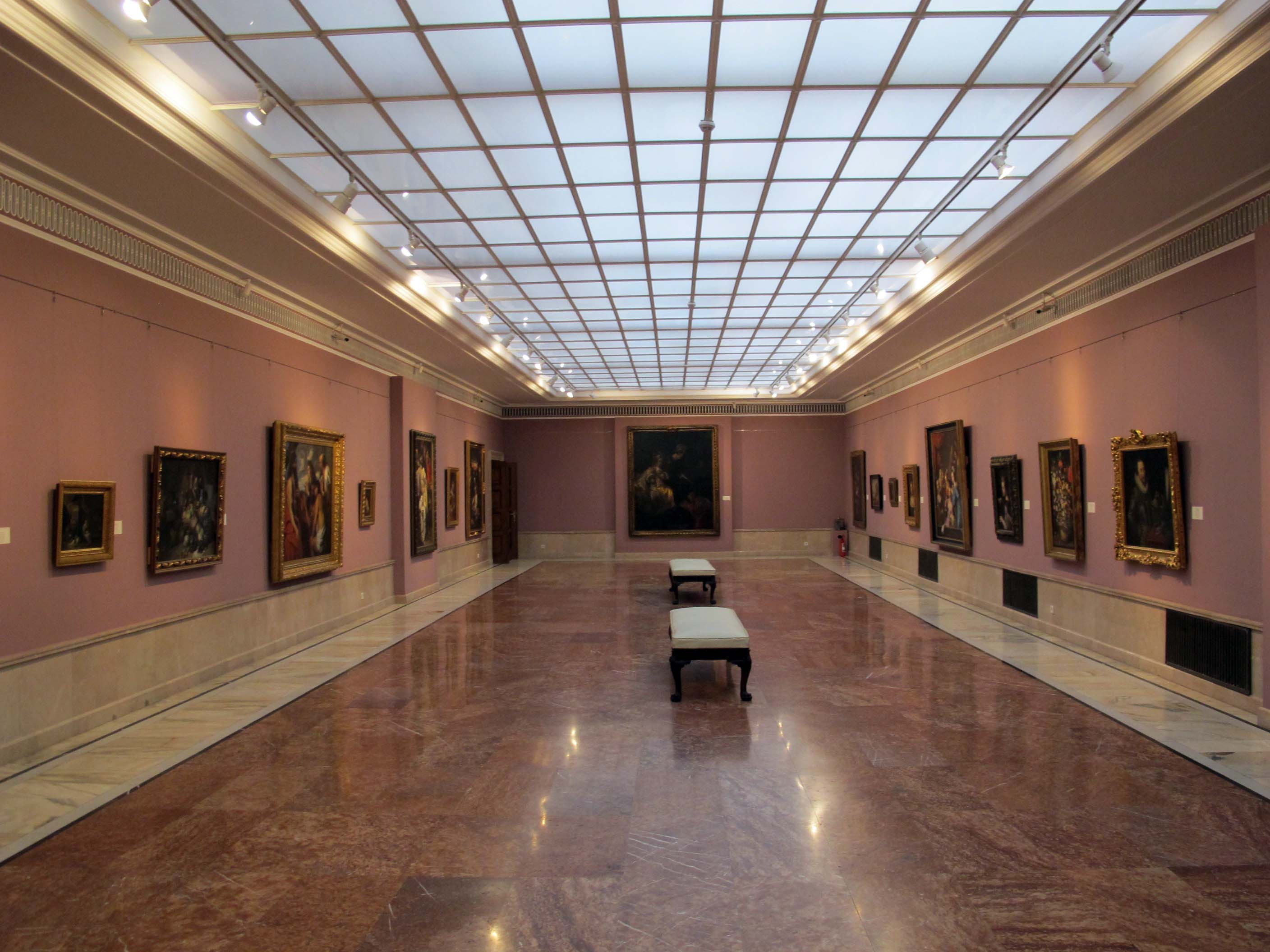 Museo d'arte di bucarest, interno 04 sala dei pittori fiamminghi e olandesi del XVI sec